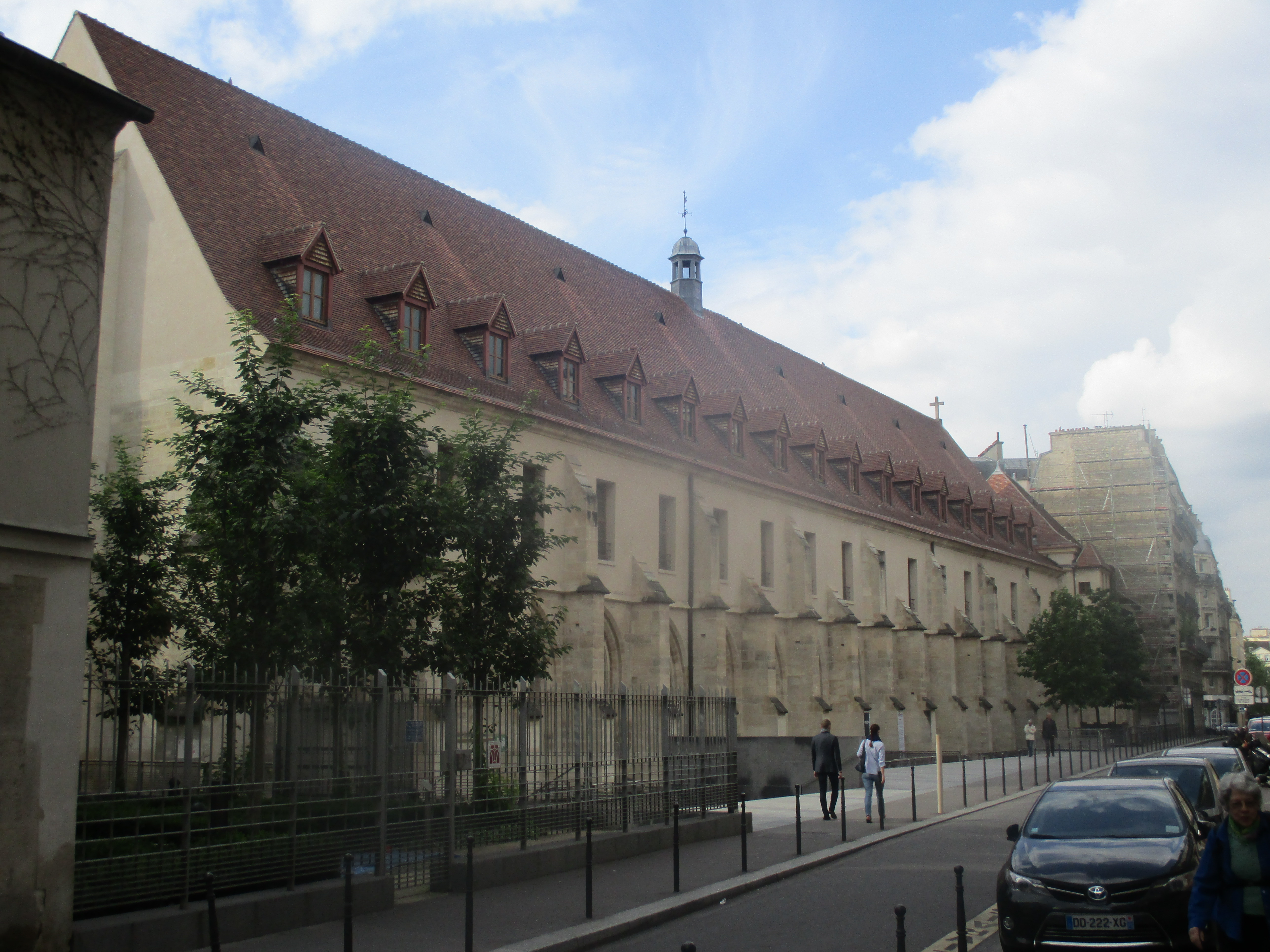 Collège des Bernardins, rue de Poissy.